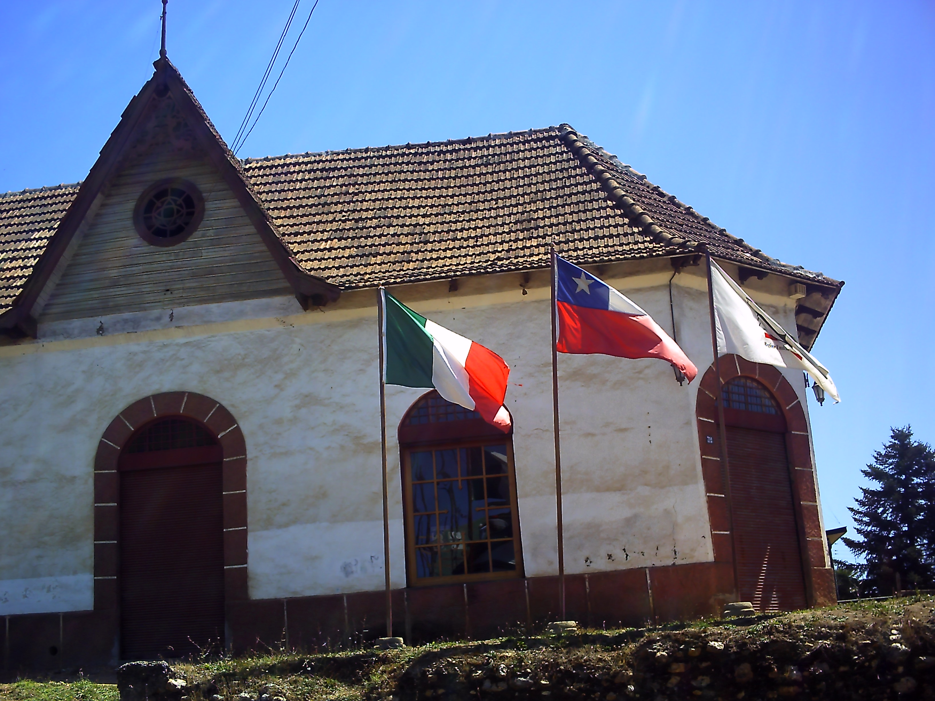 Casa de Capitán Pastene